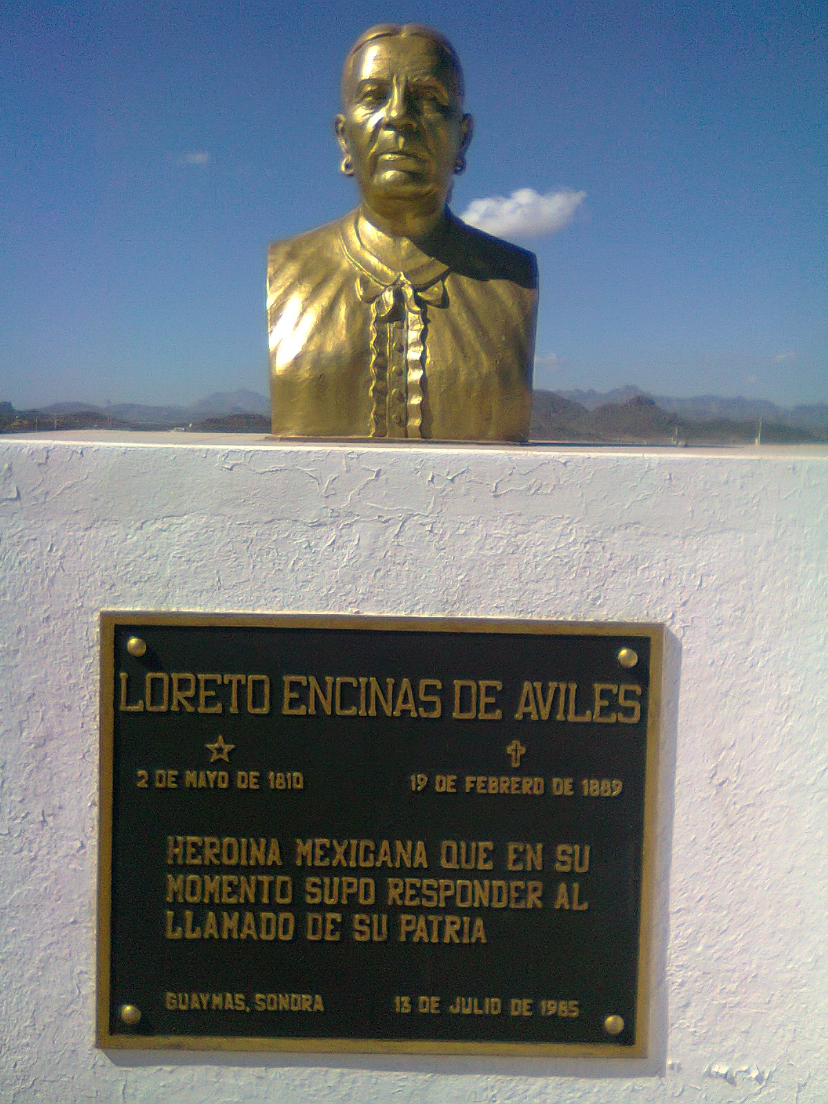 loreto encinas de aviles en el panteon municipal de Guaymas Sonora